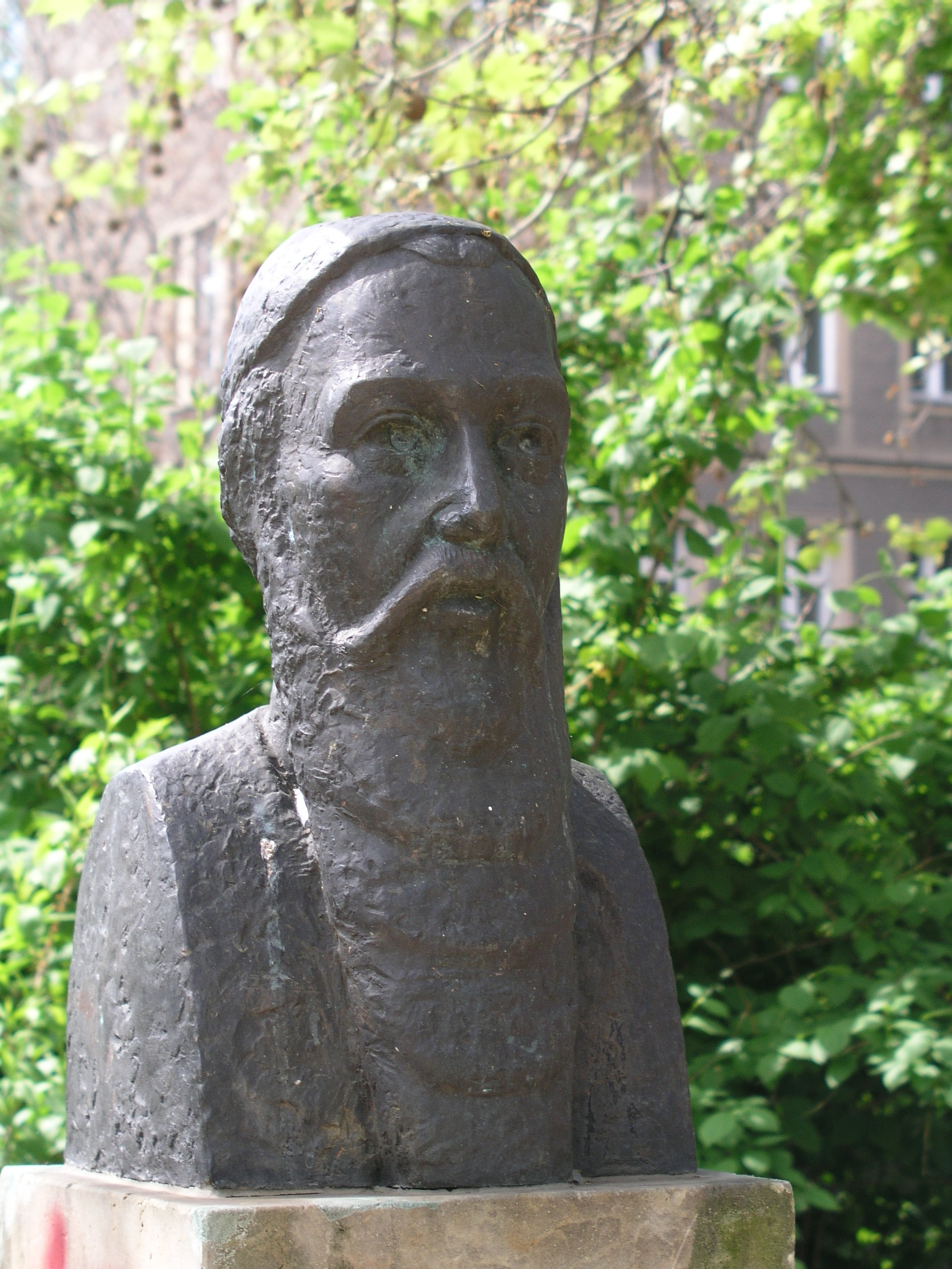 Comeniusbüste auf dem Berliner Comeniusplatz, Bildhauer Siegfried Wehrmeister